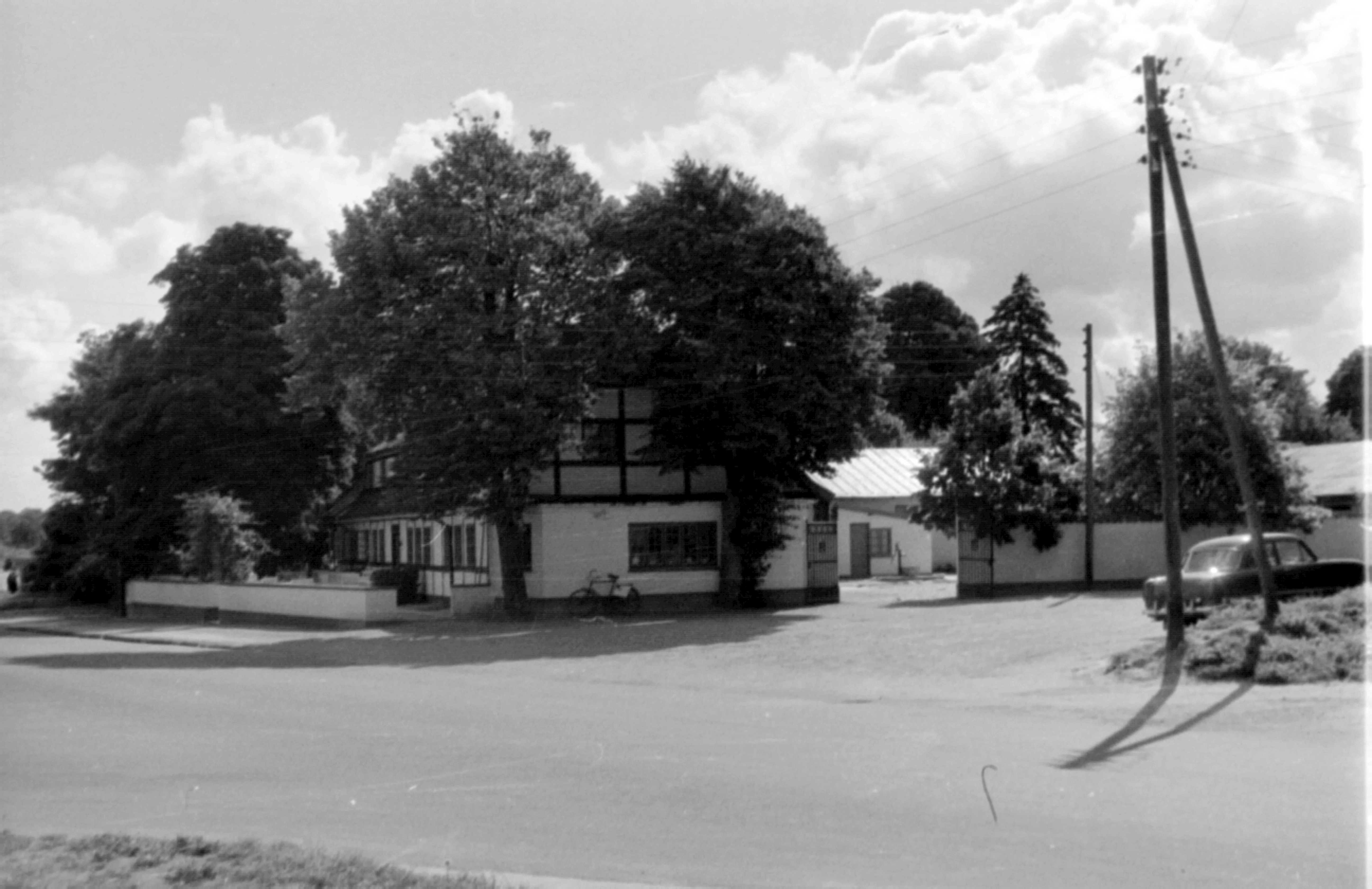 Billed af Yderholm Kro